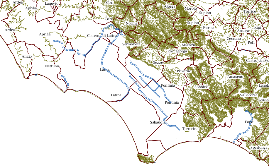 Curve di livello a 50 metri e mappa dei principali canali artificiali dell'Agro Pontino